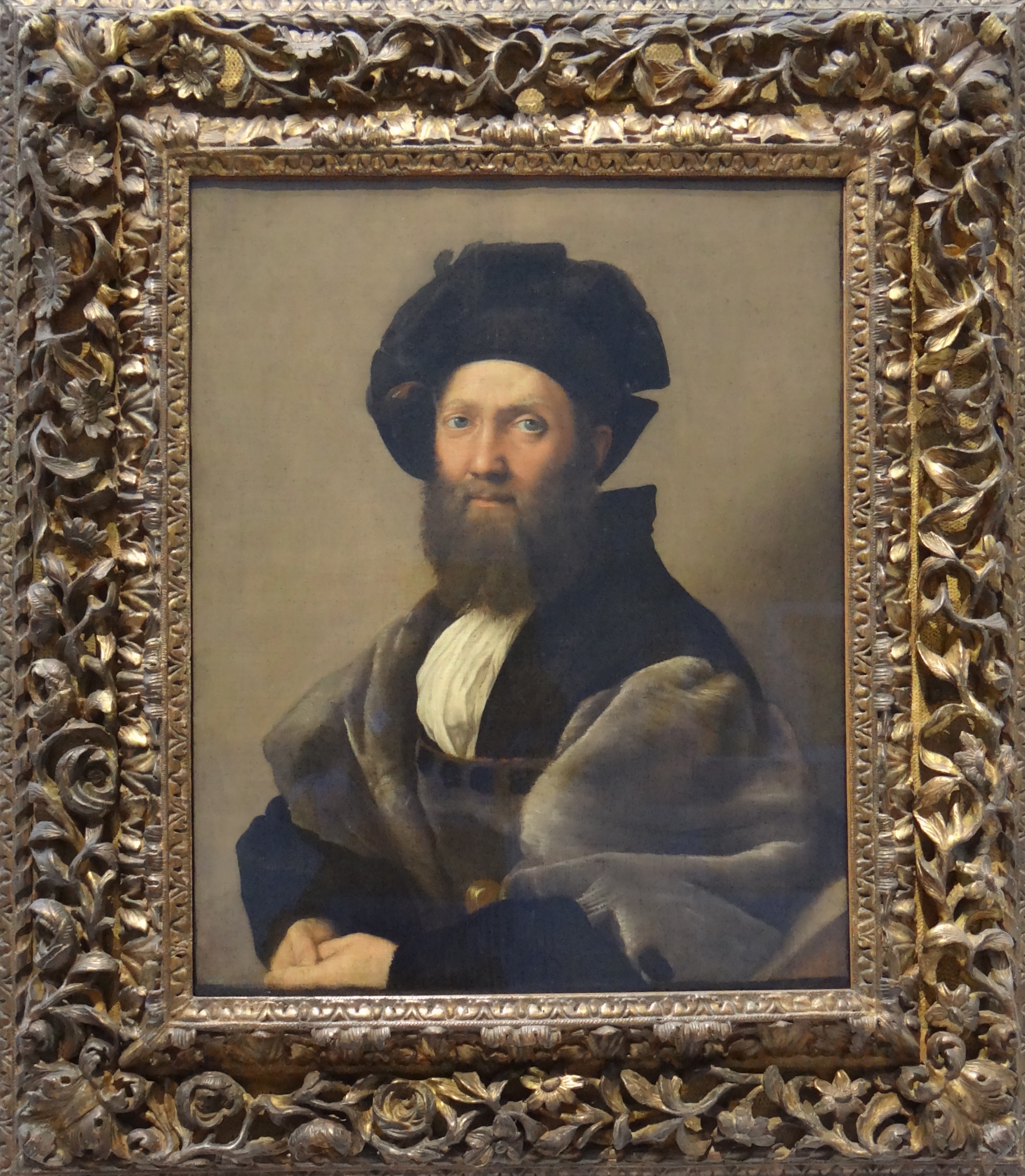 Portrait de Baldassare Castiglione (1478-1529) par Rafaello Santi ou Sanzio di Raphael (Urbino 1483- rome 1520)